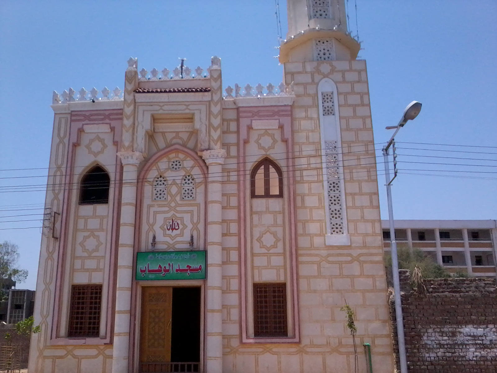 يقع عللى كورنيش النيل بالمراغه